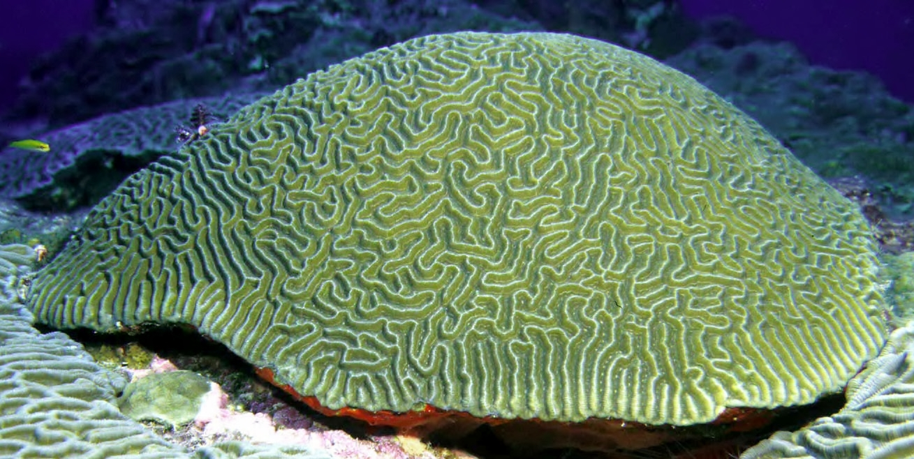 Pseudodiploria strigosa, rodeada por Colpophyllia natans. Flower Garden Banks, EE.UU.